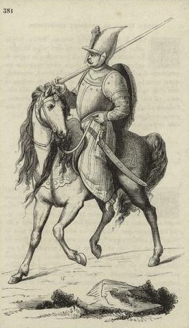 Costumes anciens et modernes by Cesare Vecellio (ca. 1521-1601)